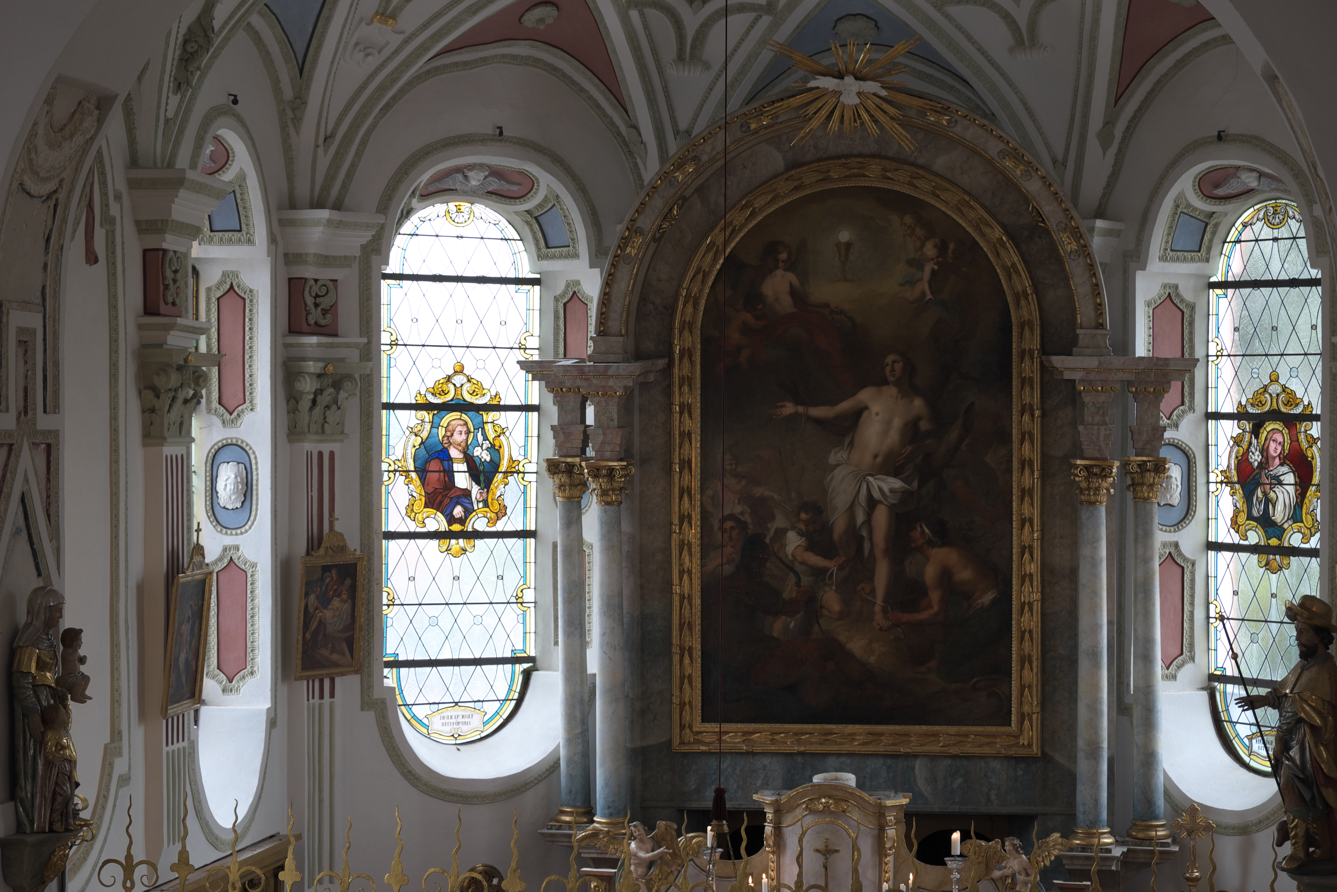 Katholische Wallfahrtskirche Heilig Blut in Einsbach, einem Ortsteil von Sulzemoos im Landkreis Dachau (Bayern/Deutschland), Chor